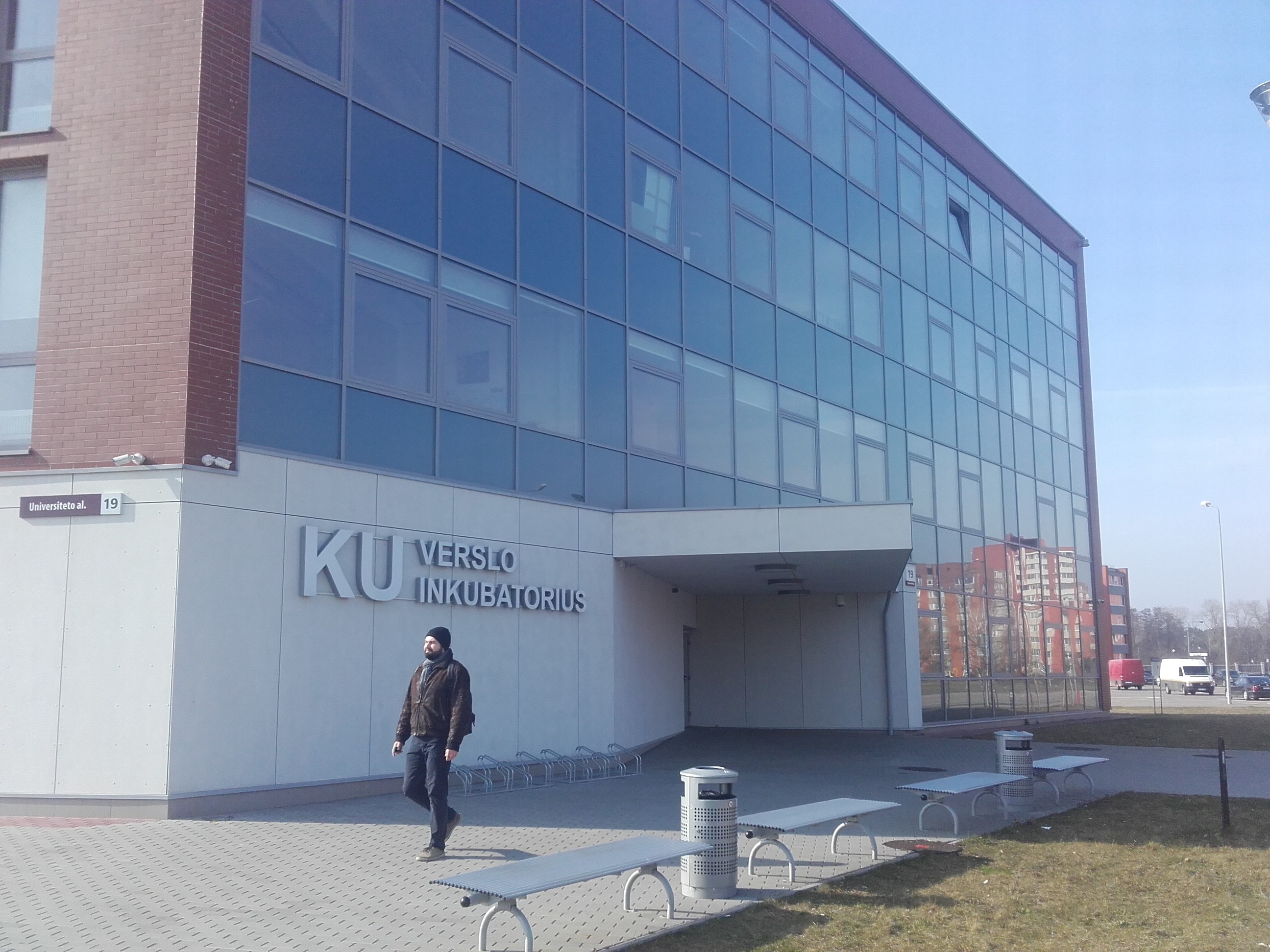 Žemaitėška: KU versla ėnkobatuorios